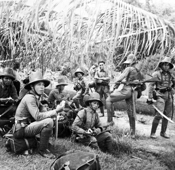 Repronegatief. Een groep Indische militairen rust uit bij het oversteken van een rivier